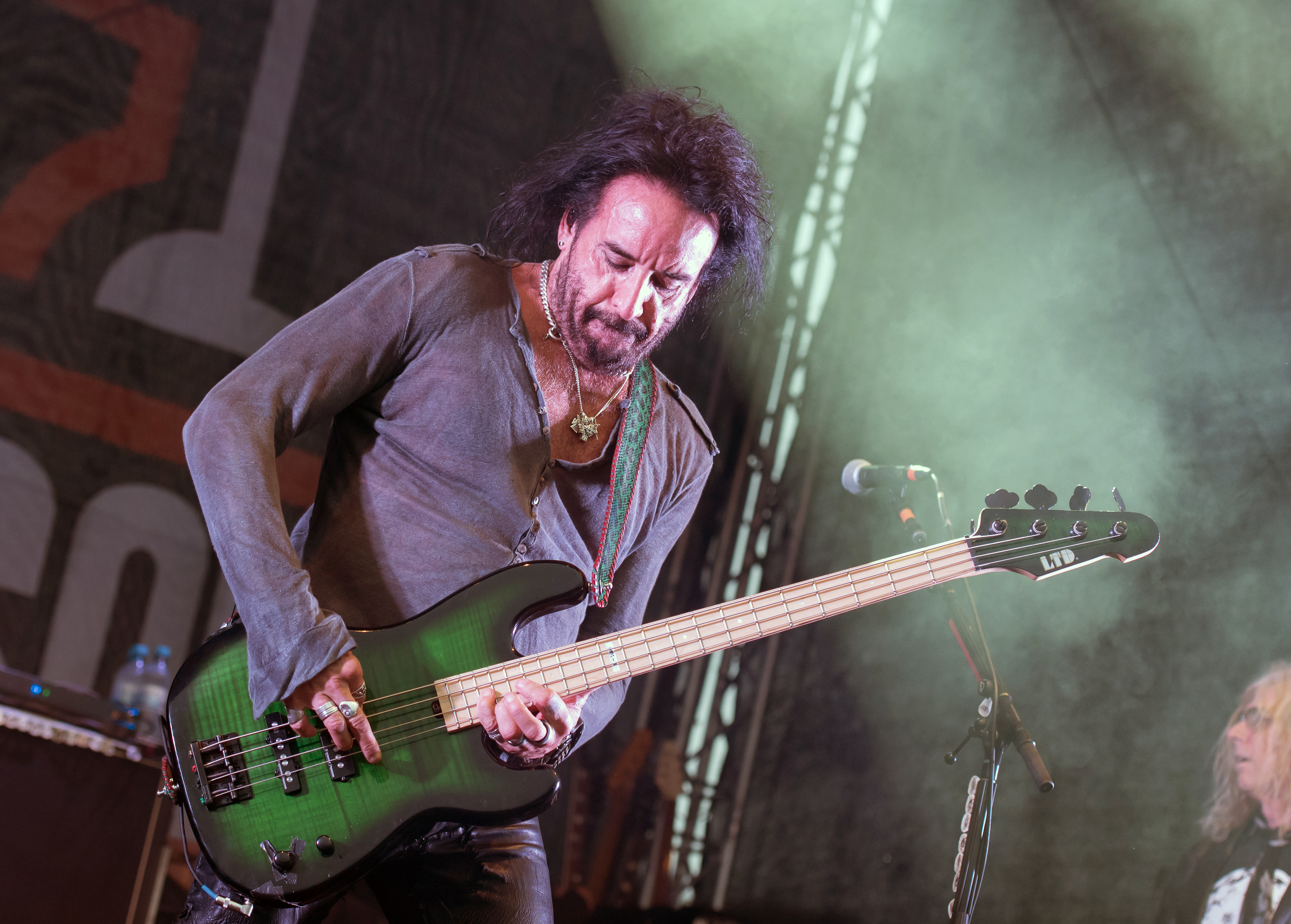 The Dead Daisies bei den Hamburg Harley Days 2017